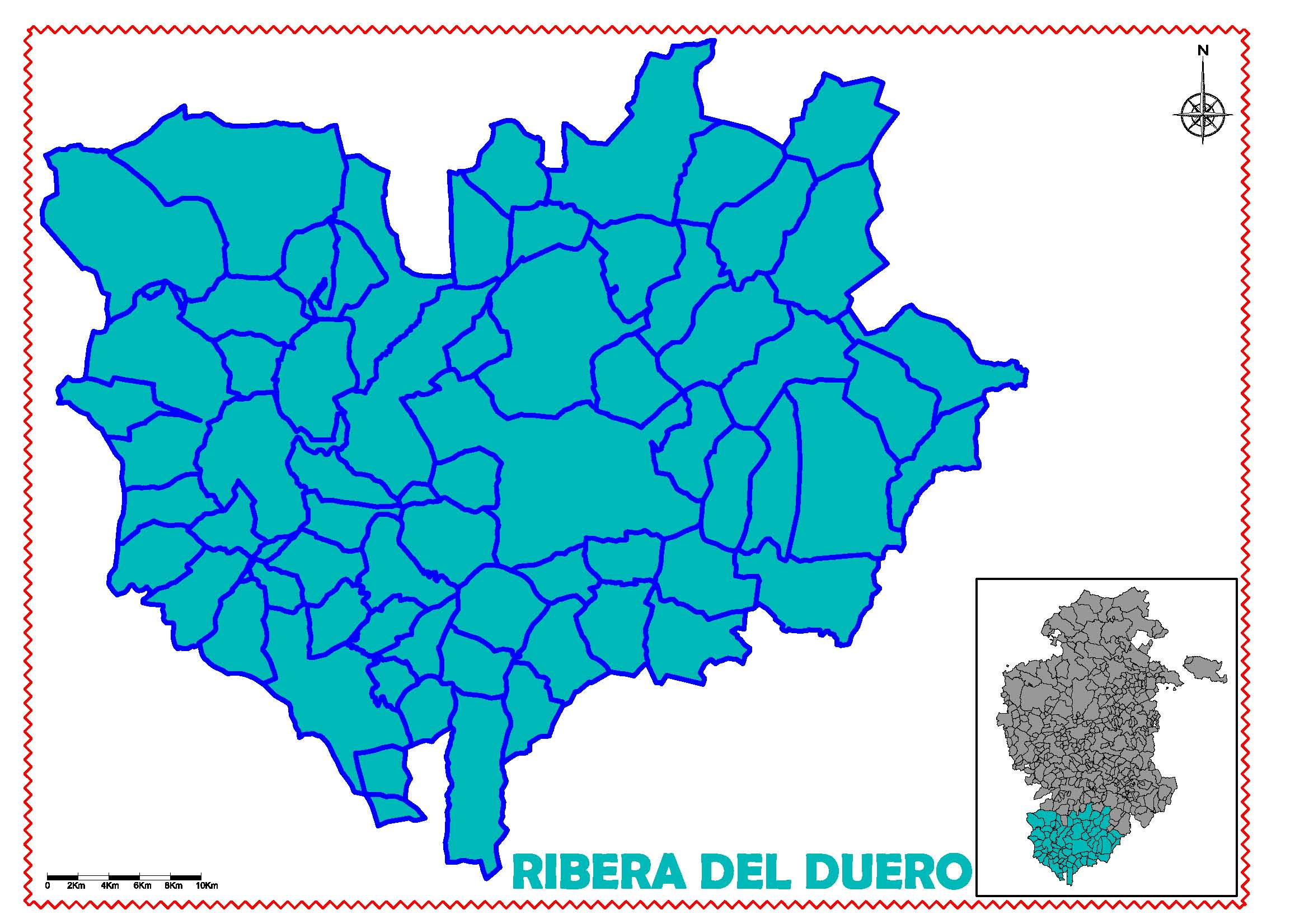 Ubicación de la comarca "Ribera del Duero" en la provincia de Burgos